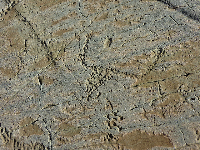 Illustration de la technique en cupules utilisée pour graver les dessins